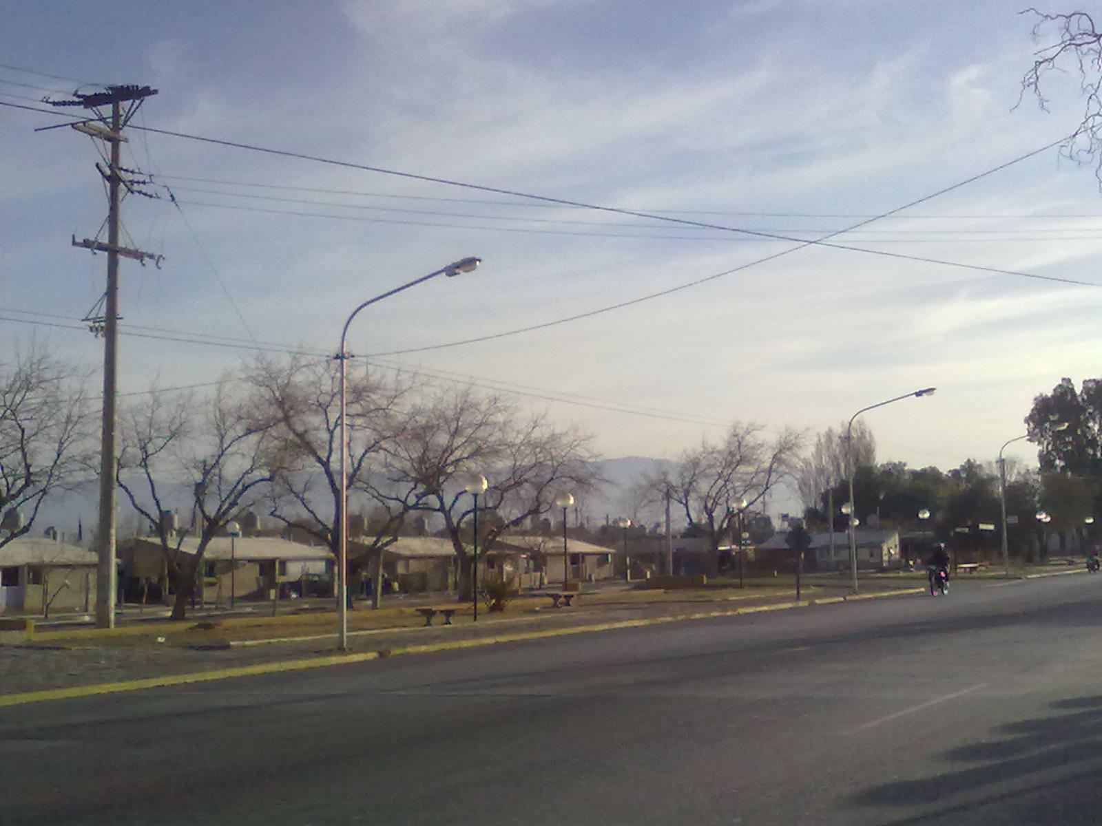 las calles del la ciuda de rawson en las puertas